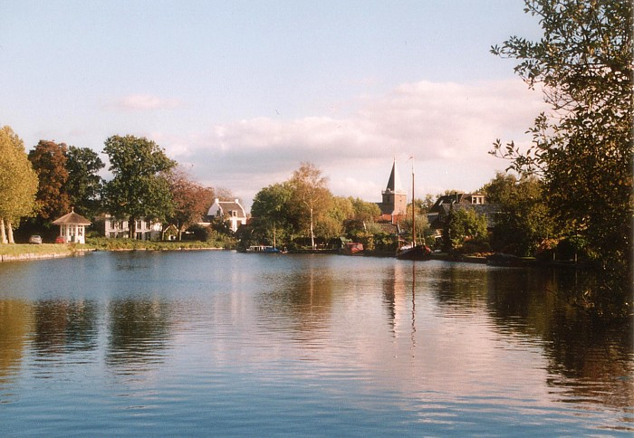 Vreeland.